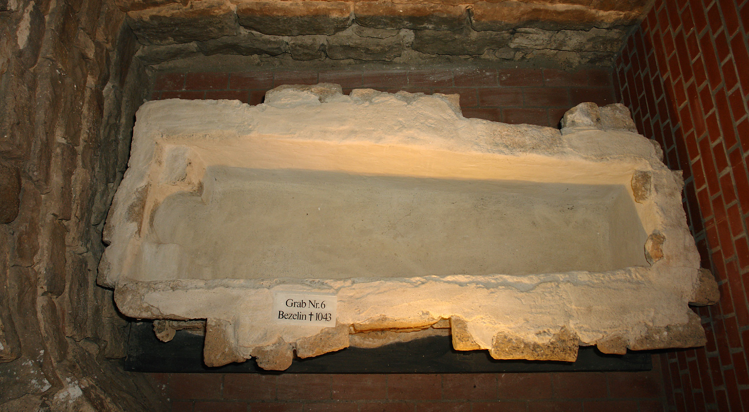 Bremer Dom (Museum): Grabstelle von Erzbischof Bezelin. Enthielt bei der Bergung (1973-1976) eine Nachbestattung